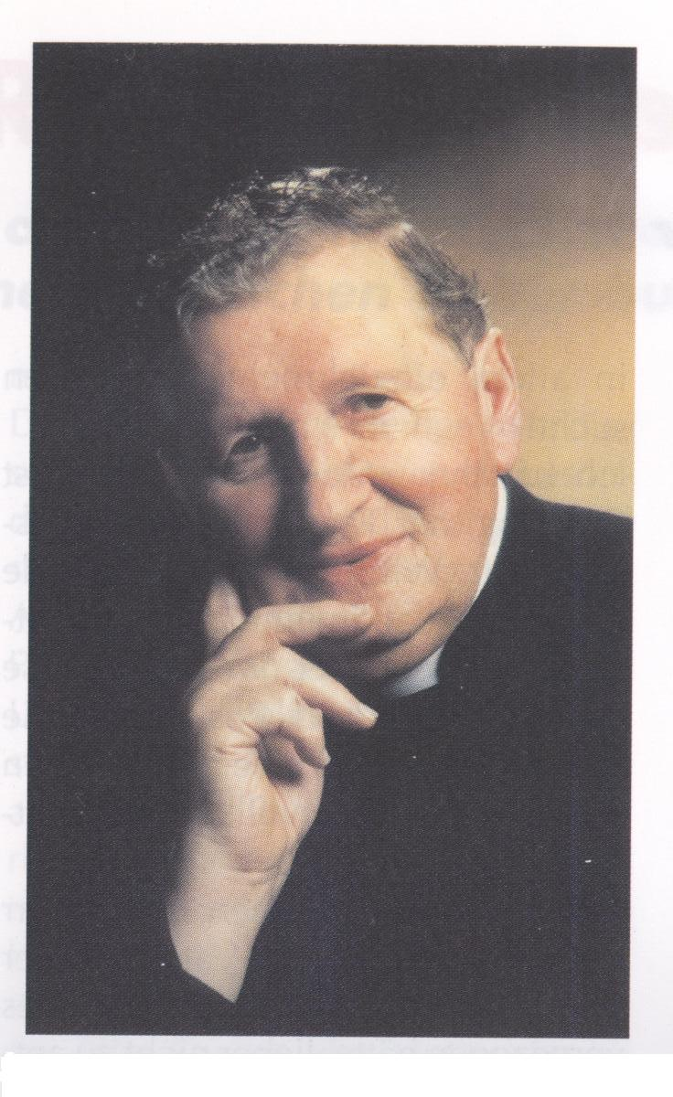 Pfarrer Raymond Arnette Frankenthal, Diözese Speyer